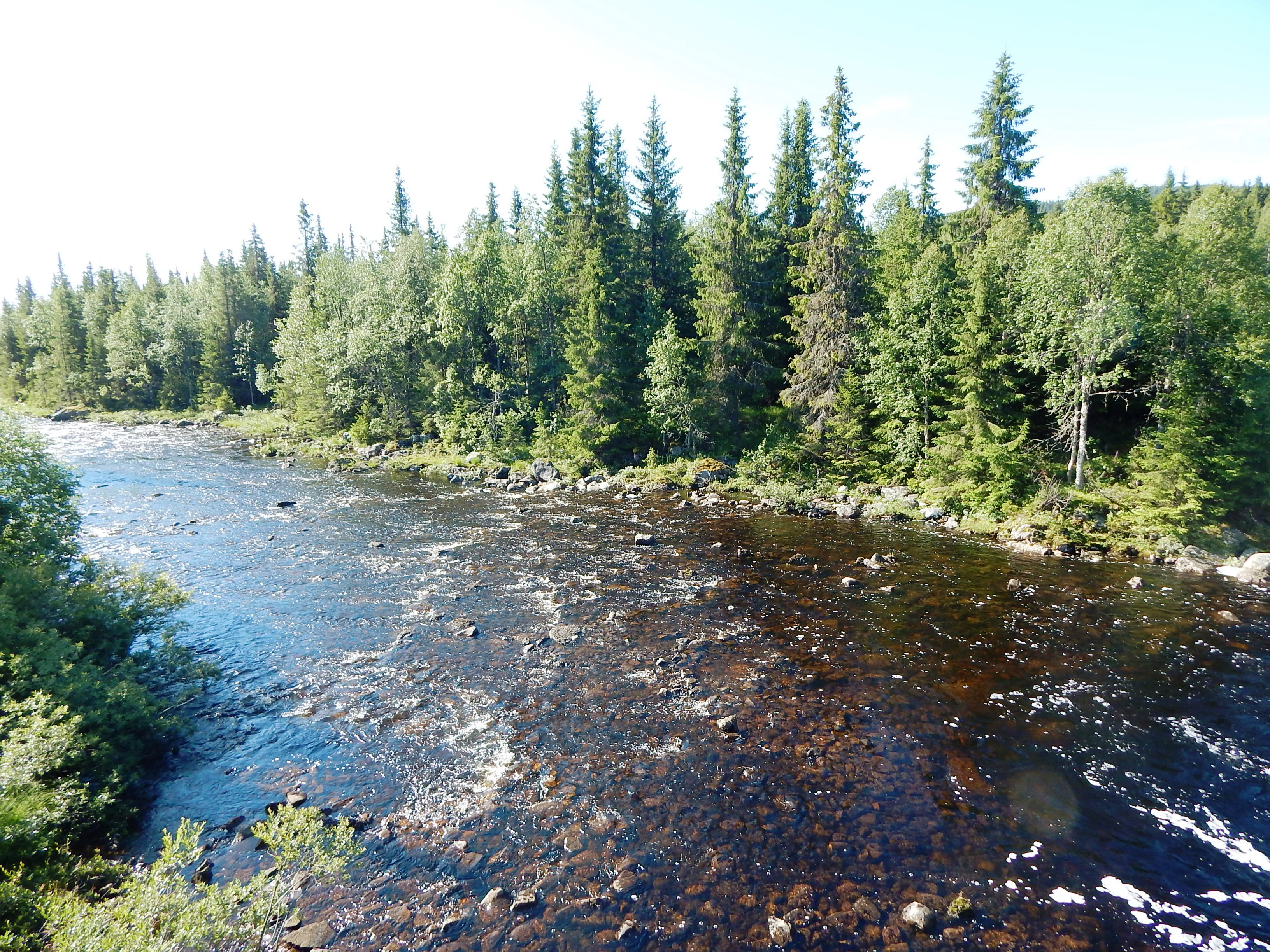 Vismunda ved Storlondammen